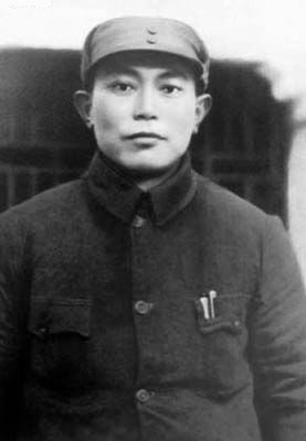 中文（中国大陆）: 中原军区司令员李先念